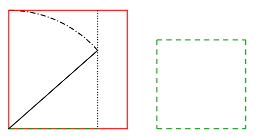 Illustration de la construction d'un carré d'aire égale à la différence des aires de deux autres carrés selon une méthode décrite dans les Sulba-Sutras.